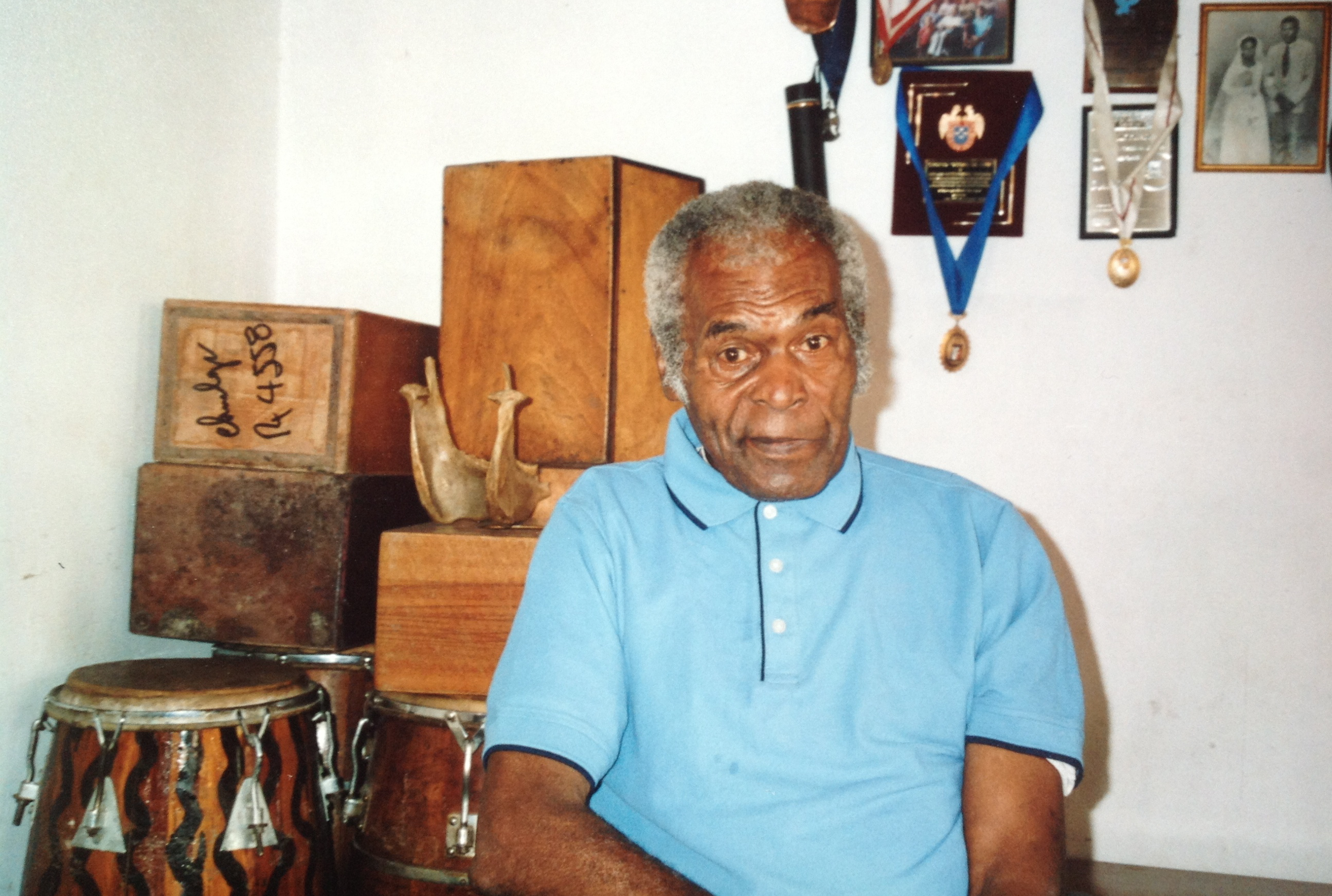 Le musicien Amador Ballumbrosio chez lui à El Carmen - Chincha - Amador Ballumbrosio décédé en 2009 fut l'un des plus important musicien et danseur afro-péruvien - Prise de vue effectuée durant le tournage du Documentaire "Negra" réalisé par Franck Schneider